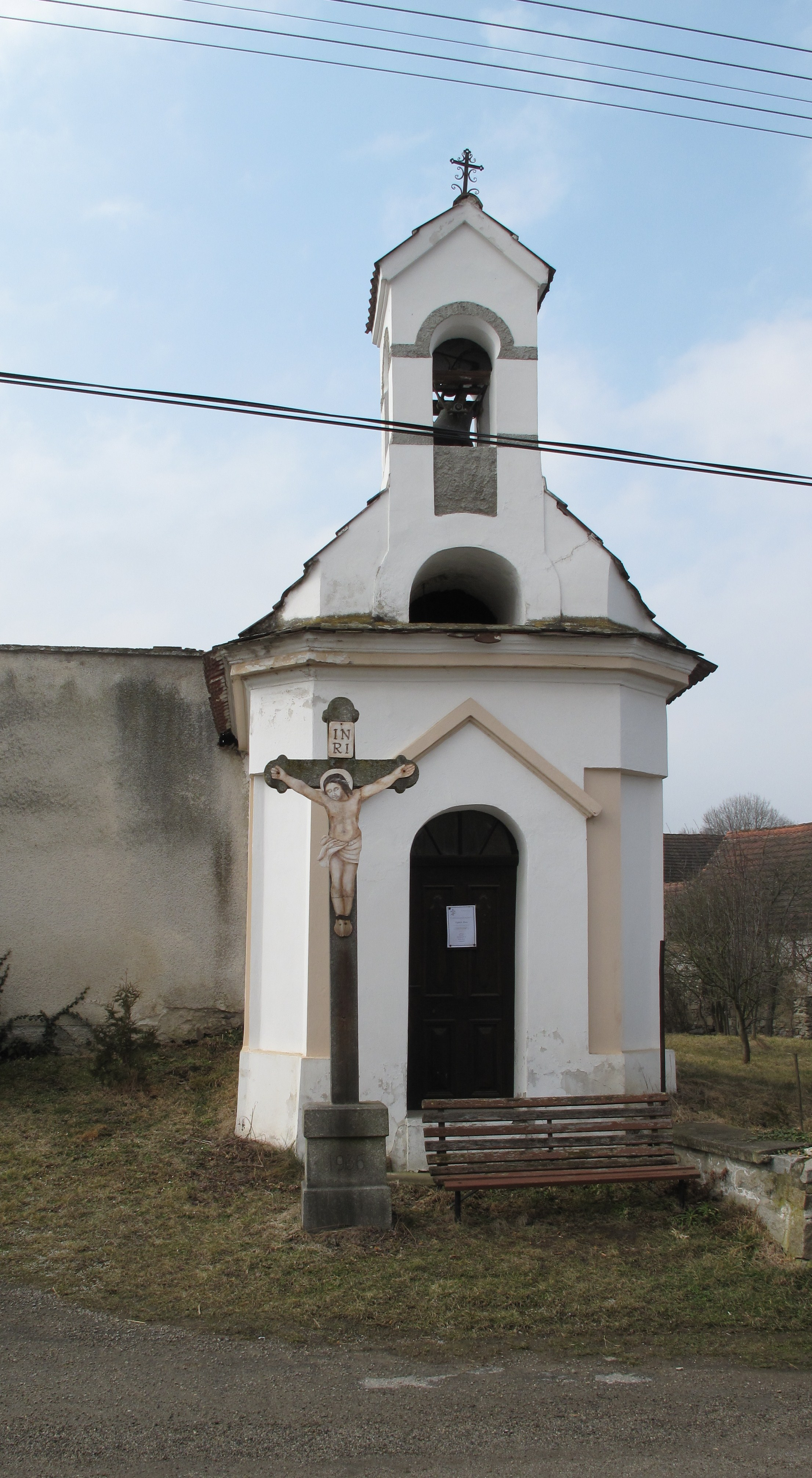 Kaplička v Bohunicích. Okres Prachatice, Česká republika.